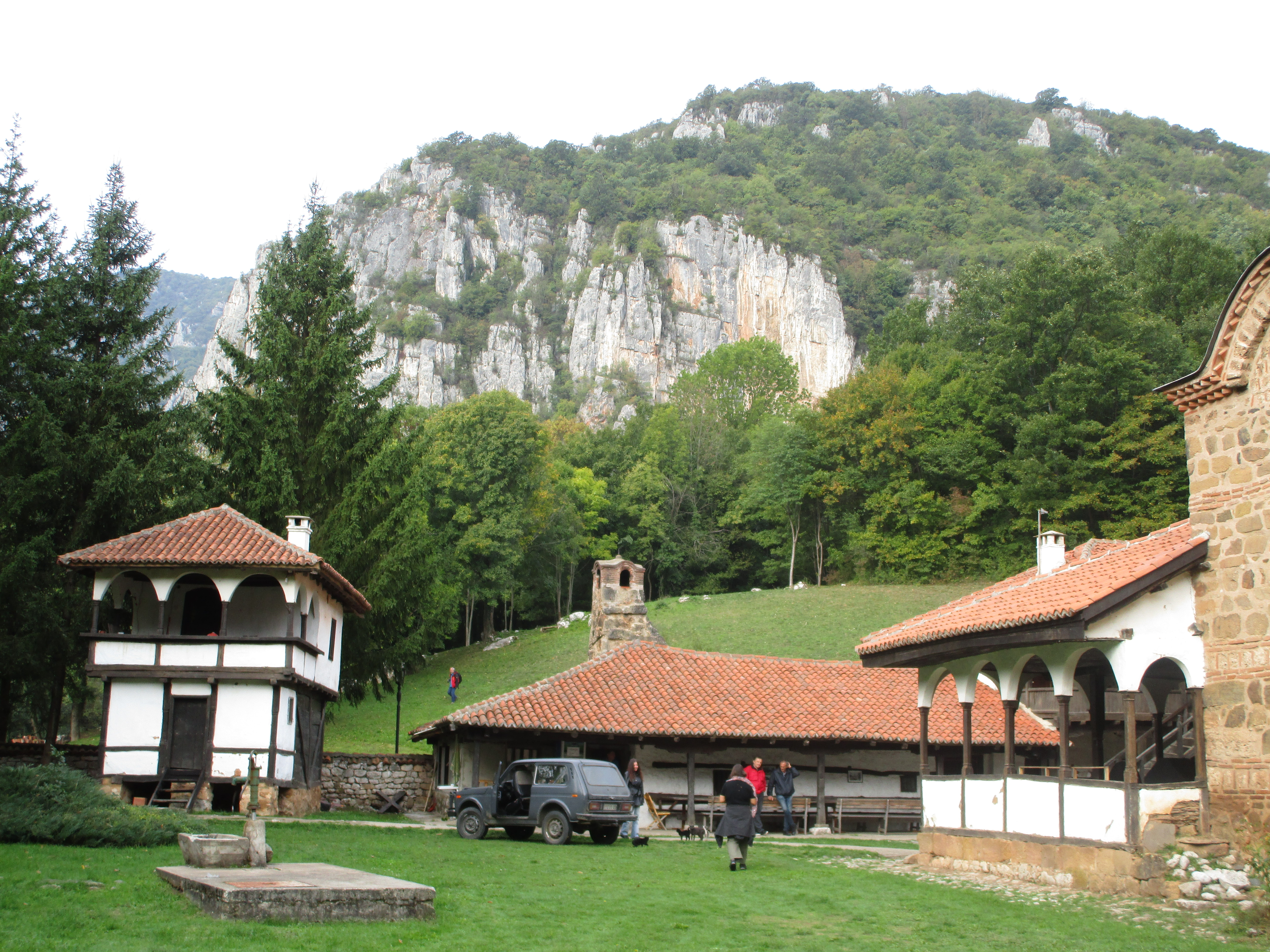 Српски (ћирилица): Манастир Поганово